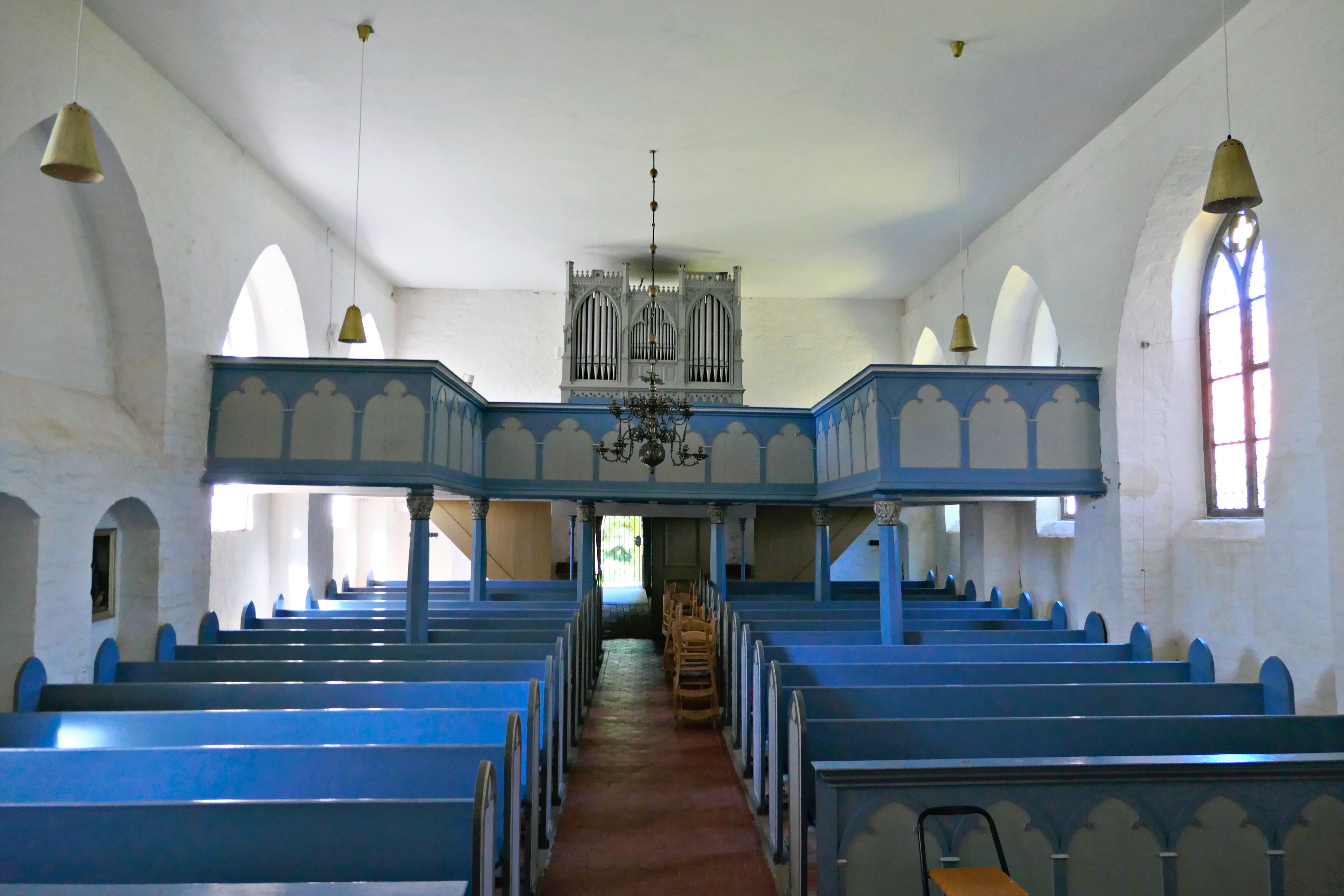 Orgel der Dorfkirche Roggenstorf, Landkreis Nordwestmecklenburg, Mecklenburg-Vorpommern, Deutschland